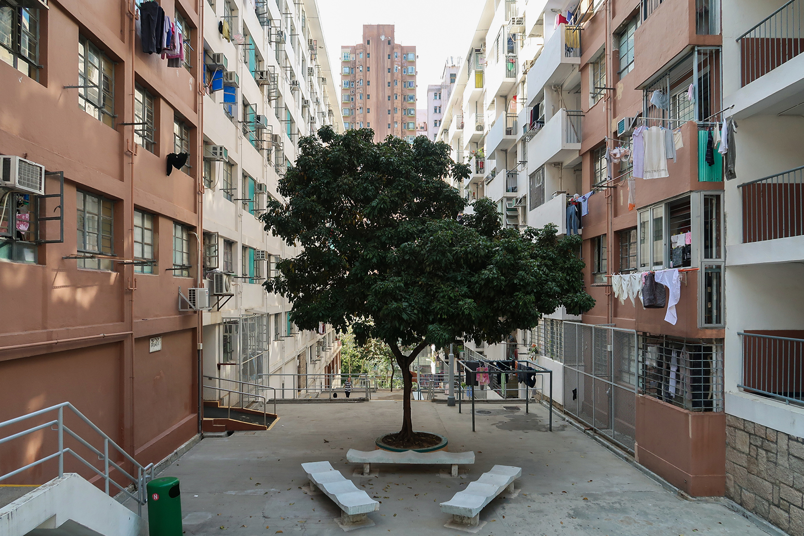 Ming Wah Dai Ha